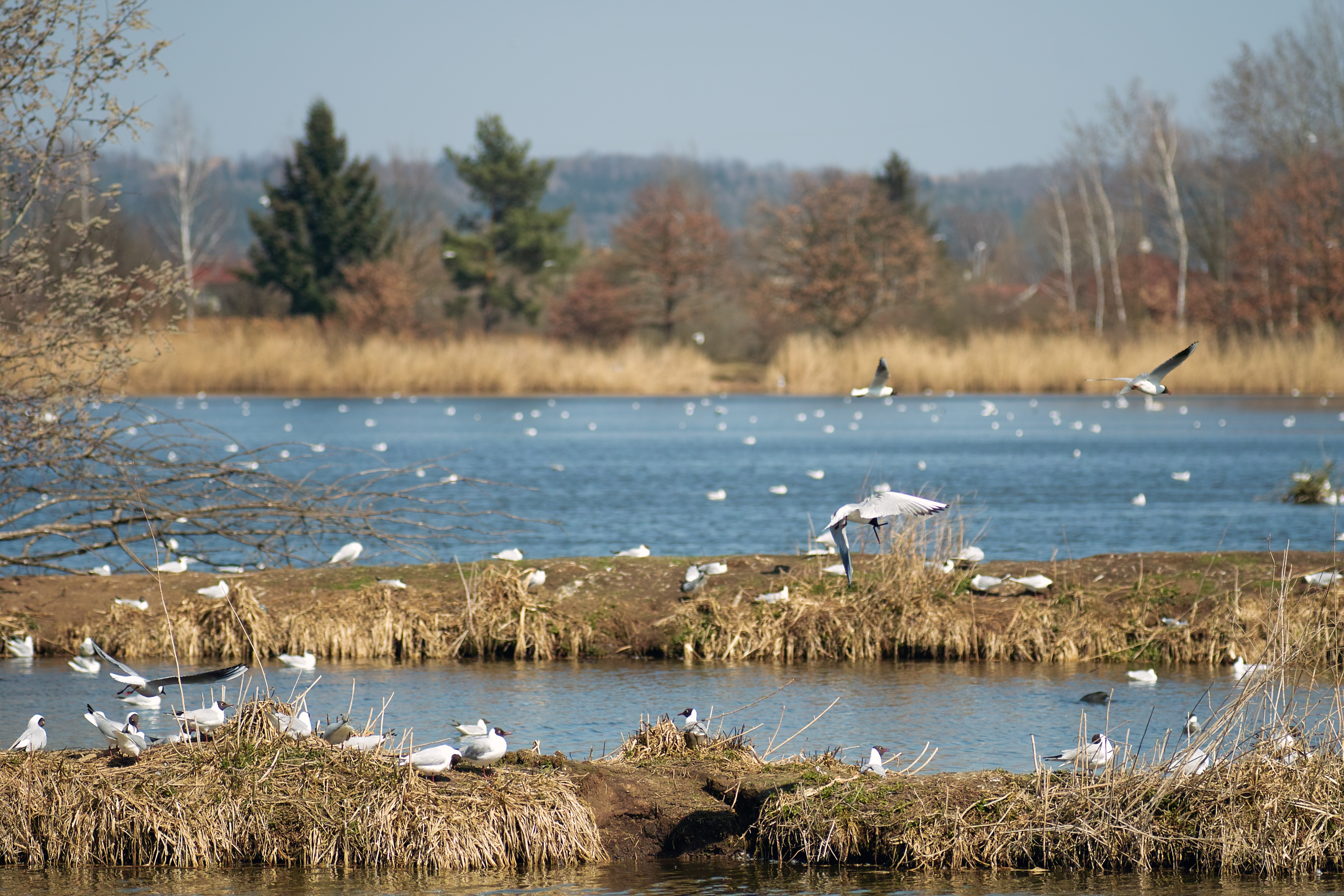 Vrbenské rybníky, Domin, racek chechtavý